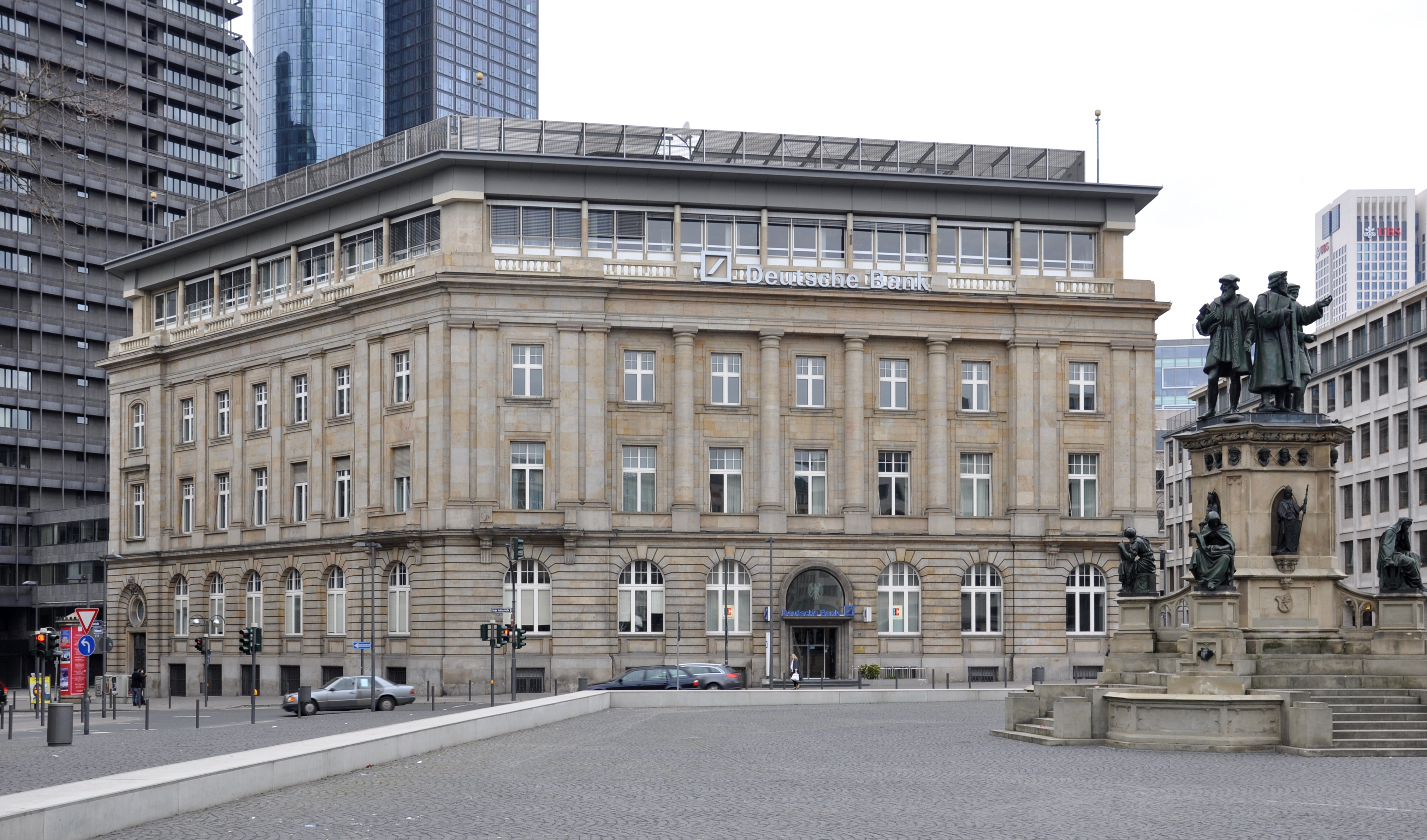 Frankfurt am Main, Deutsche Bank am Roßmarkt, 1957–1984 Hauptsitz der Deutschen Bank; erbaut 1904 für die Disconto-Gesellschaft